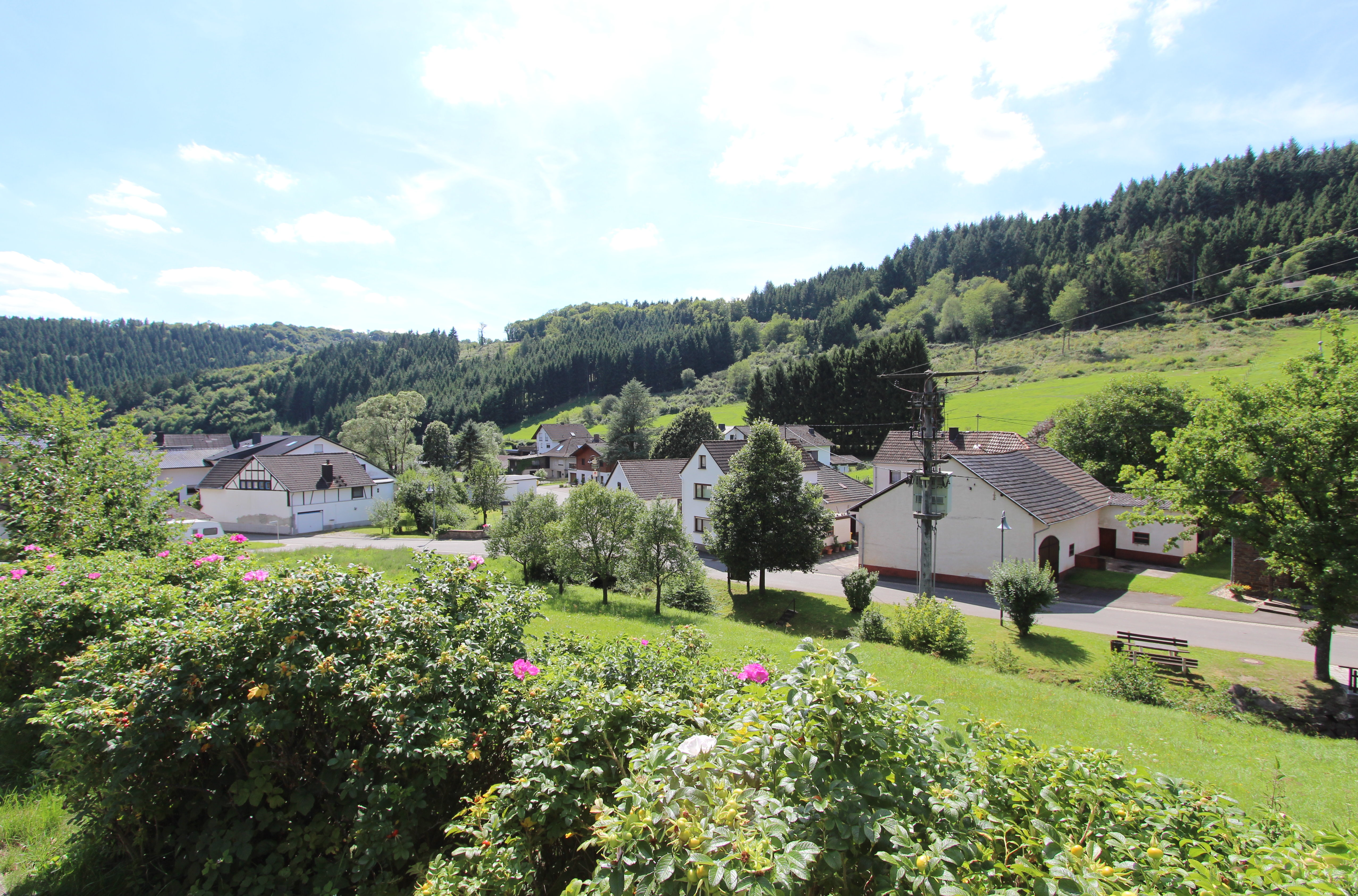 53506 Lind, Ortsteil Obliers, Im Scheuergarten. Blick auf den Ortteil. Aufnahme von 2017.